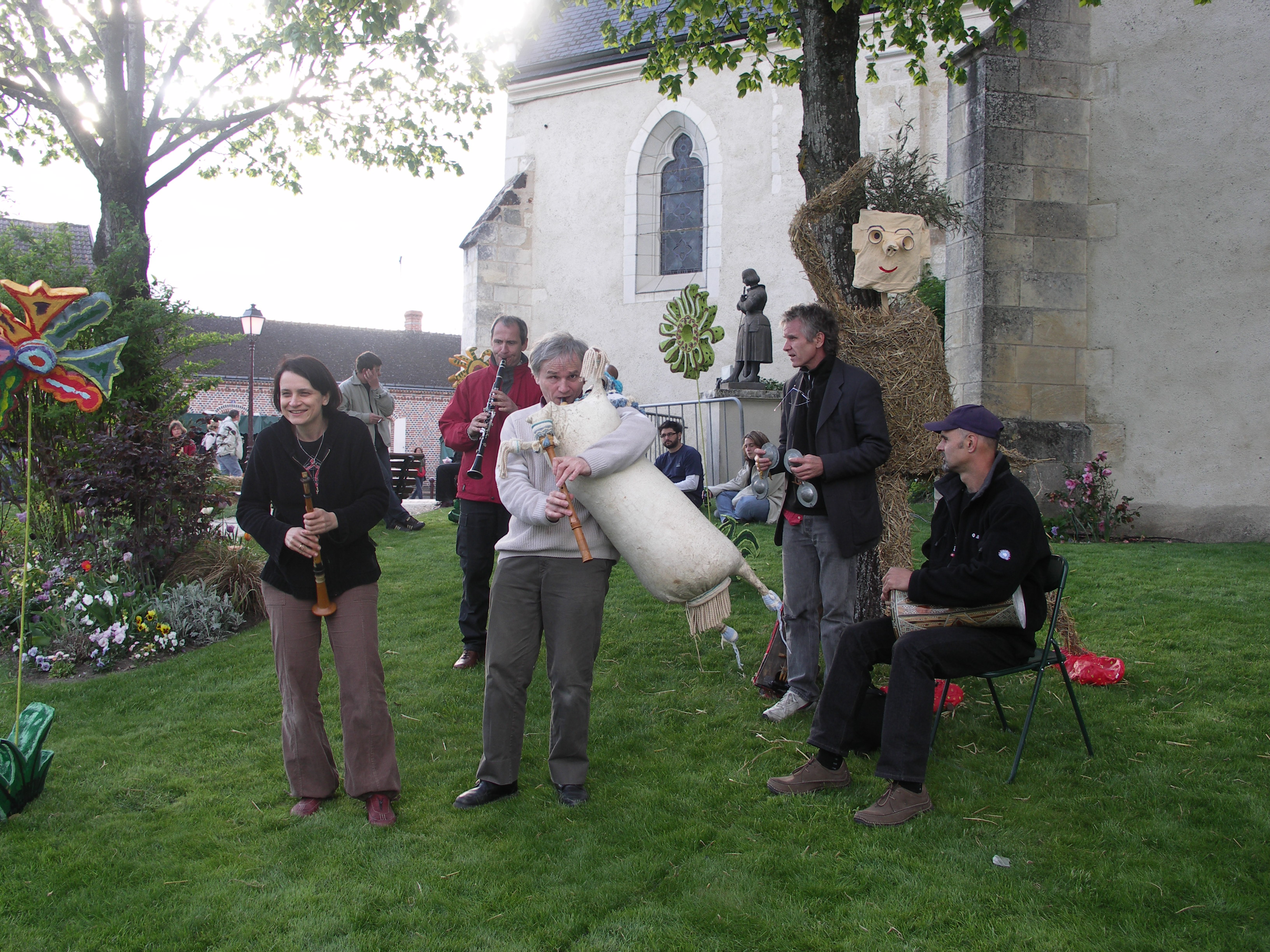 LA TALVERA A PIERREFITTE